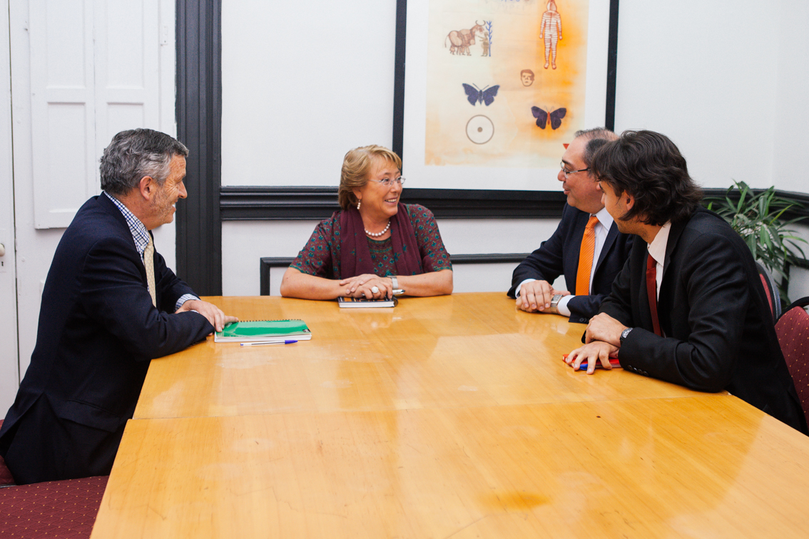 Presidenta Electa se reunió con el Movimiento Democracia Regional.